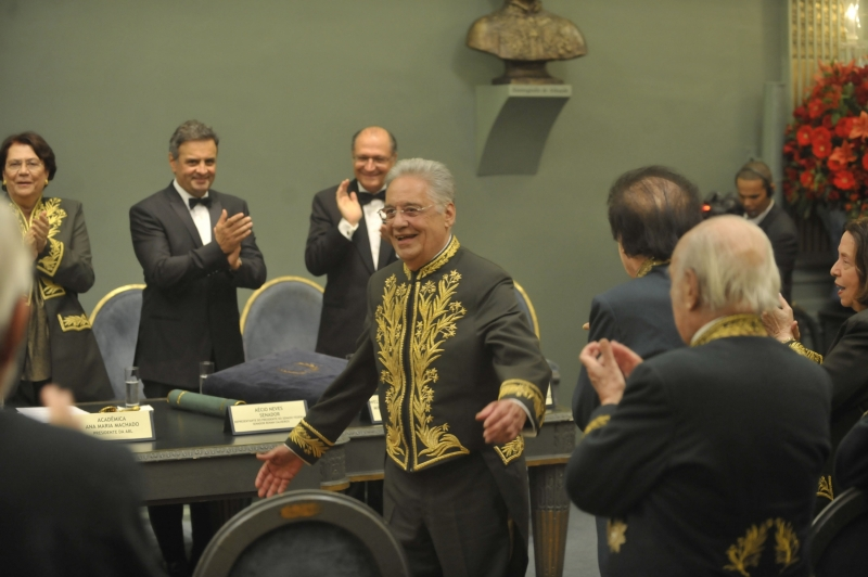 O ex-presidente Fernando Henrique Cardoso toma posse na cadeira número 36 da Academia Brasileira de Letras.